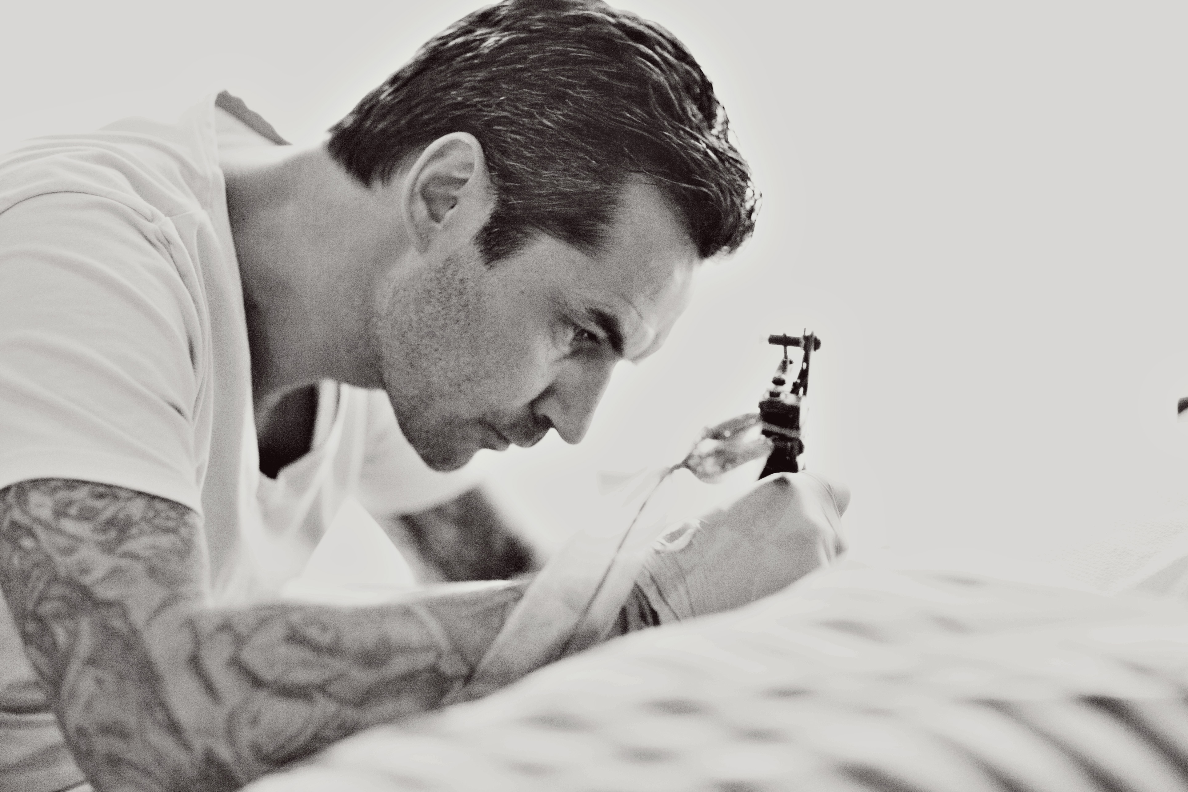 Fabrizio Divari at work